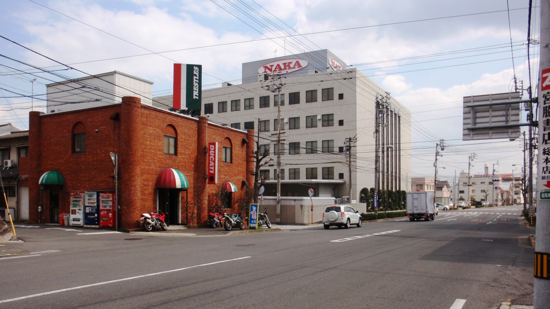 香川県高松市の市道朝日町仏生山線の起点部分から南方向を見る。これより北方向は臨港道路朝日町本線で、左から横切る路地（市道福岡町2号線）より手前が臨港道路朝日町本線、奥が市道朝日町仏生山線。